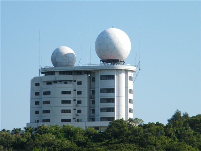 青云岩 大瞭望山顶 汕头气象台